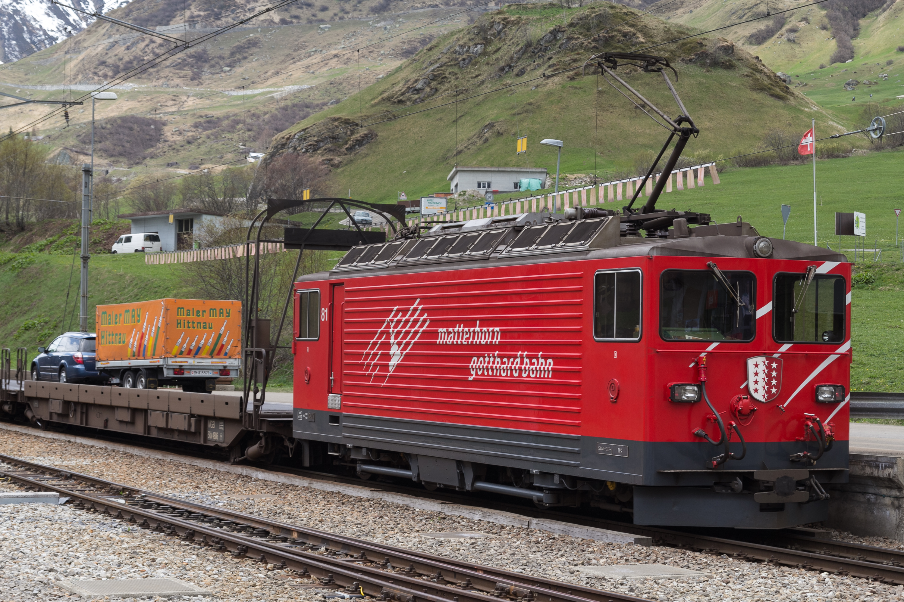 Autoverlad Furka: Ge 4/4 Nr. 81 "Wallis" der Matterhorn-Gotthard-Bahn in Realp UR